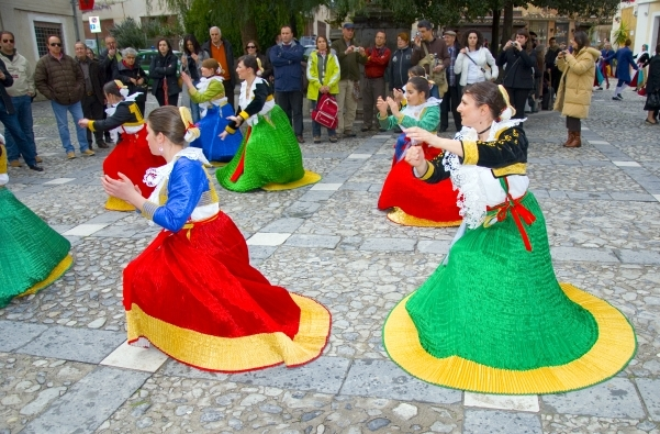 Le vallje sono danze e canti con cui gli albanesi di Calabria rievocano le gesta dell'eroe albanese Giorgio Castriota Scanderbeg. I canti sono di solito cori accompagnati da più strumenti musicali. Il ballo, la vallja, è costituita da una "catena" di Arbëreshë che si tengono per mano o legati da un fazzoletto colorato, cantano e ballano. La vallja si sposta sempre, come un drappello di soldati in battaglia. I balli si snodano nelle vie del paese e terminano nella "piazza delle vallje". Wikipedia: Civita; Parco Nazionale del Pollino. Wikipedia: Giorgio Castriota Scanderbeg; Arbëreshë